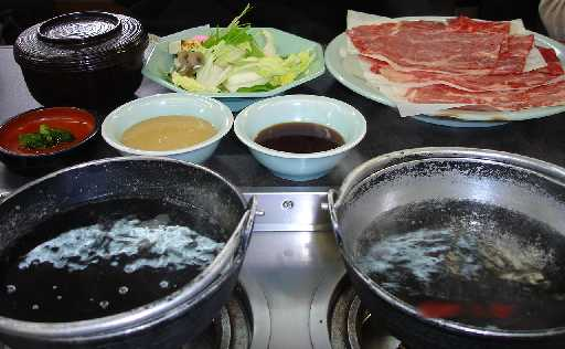 Own work. Sony, P-100